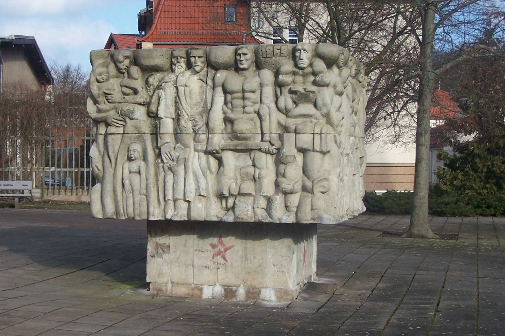 Die südliche Bildfläche symbolisiert die Entwicklung bis zur Gründung der ersten politischen Partei der Arbeiterbewegung in Deutschland. Hierfür steht das Jahr 1869. Genau 100 Jahre später wurde der Grundstein für dieses Denkmal vom SED-Politbüro-Mitglied Friedrich Ebert gelegt.